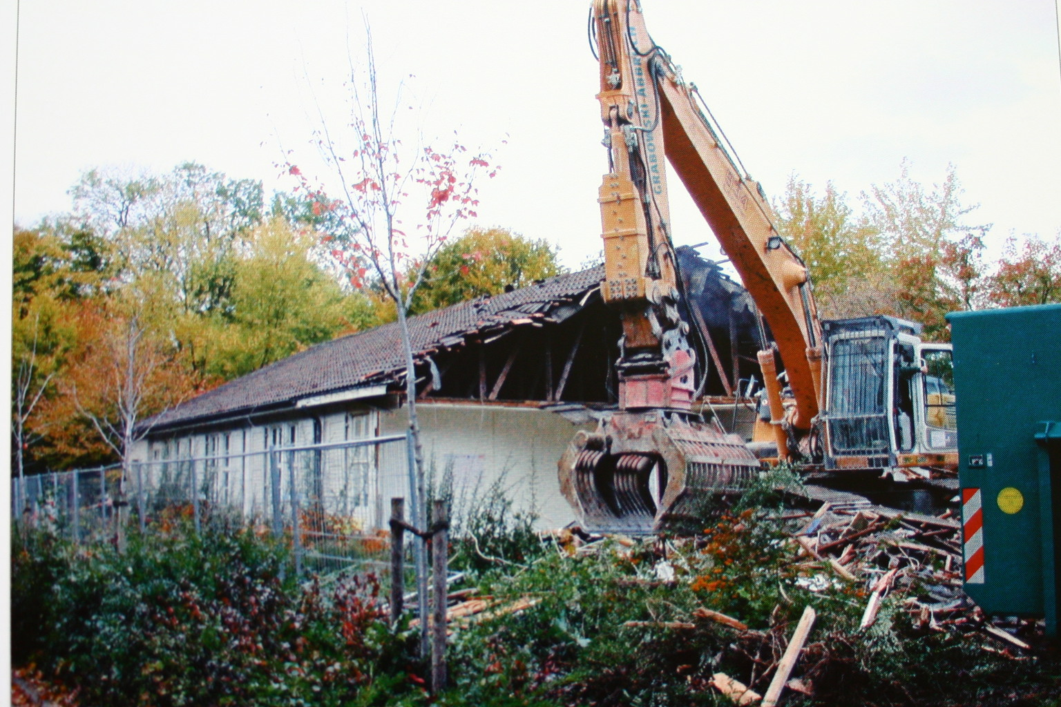 Abriss der Baracke dem ehemaligen KZ Außenlagers Neustadt